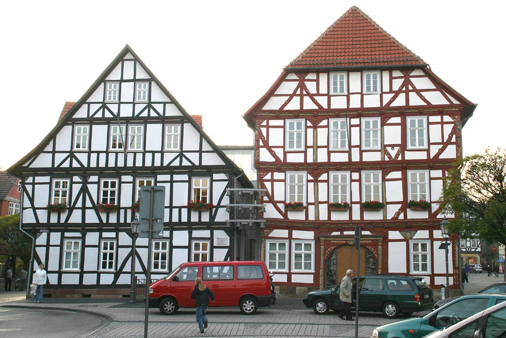 Rathaus_Eschwege.jpg (Original text: Blick auf das Eschweger Rathaus)